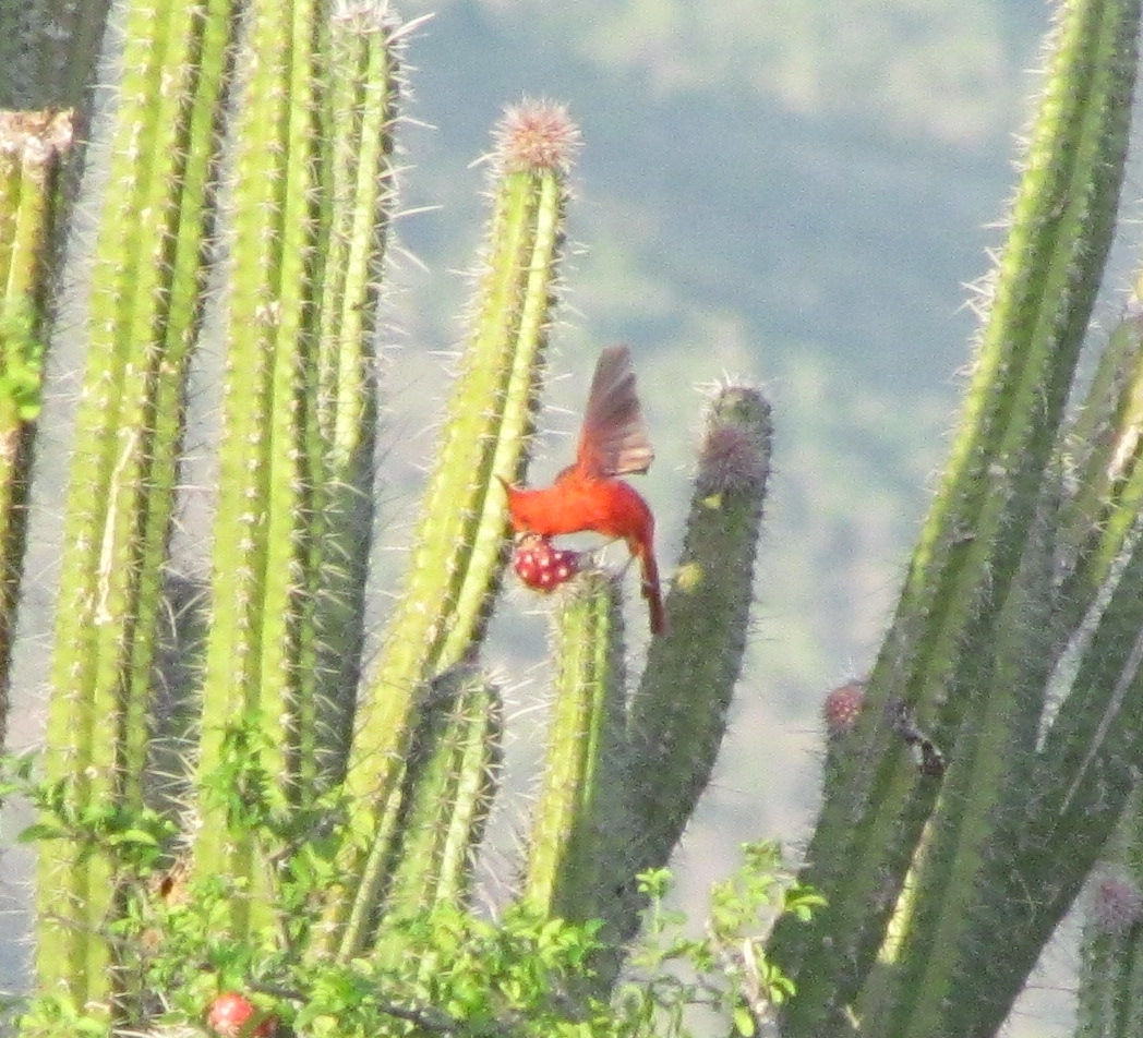 Cardenal en las Guevaras